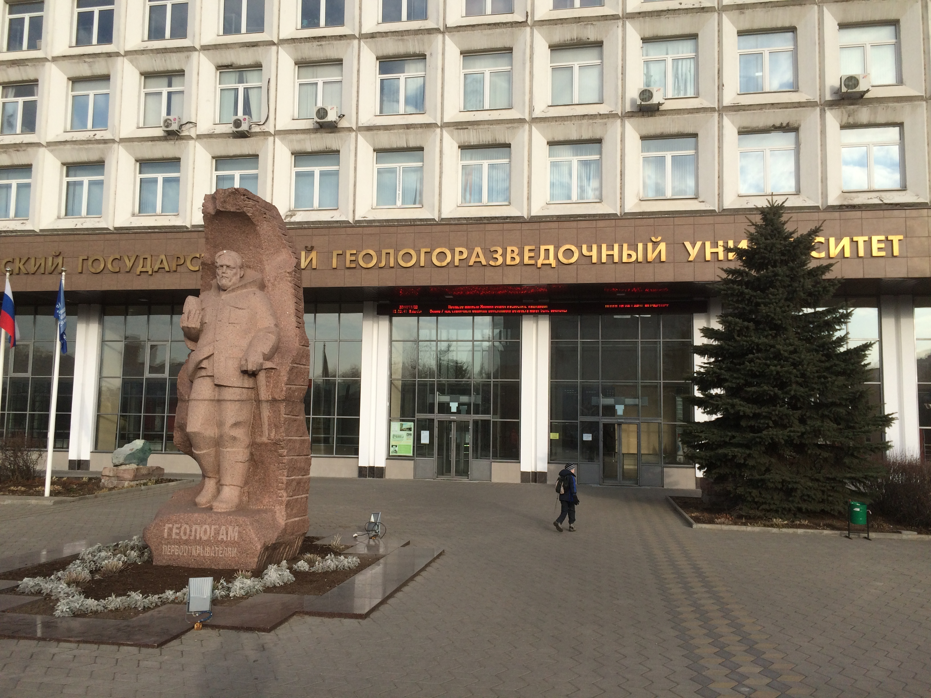 Вход в МГРИ-РГГУ